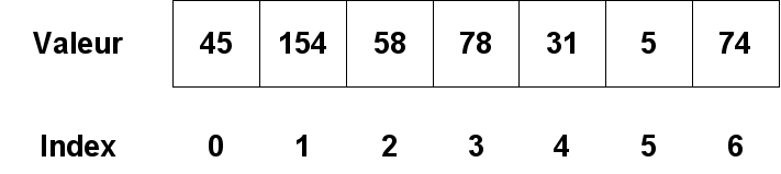 Représente un tableau (en informatique) à une dimension Origine : Je suis le créateur